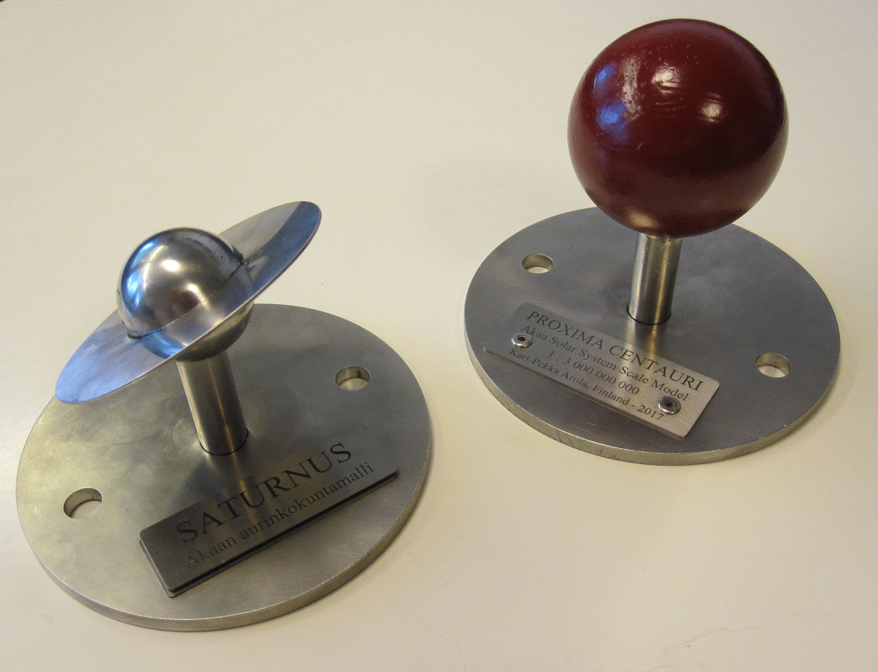 Saturnuksen ja Proxima Centaurin pienoismallit vierekkäin.